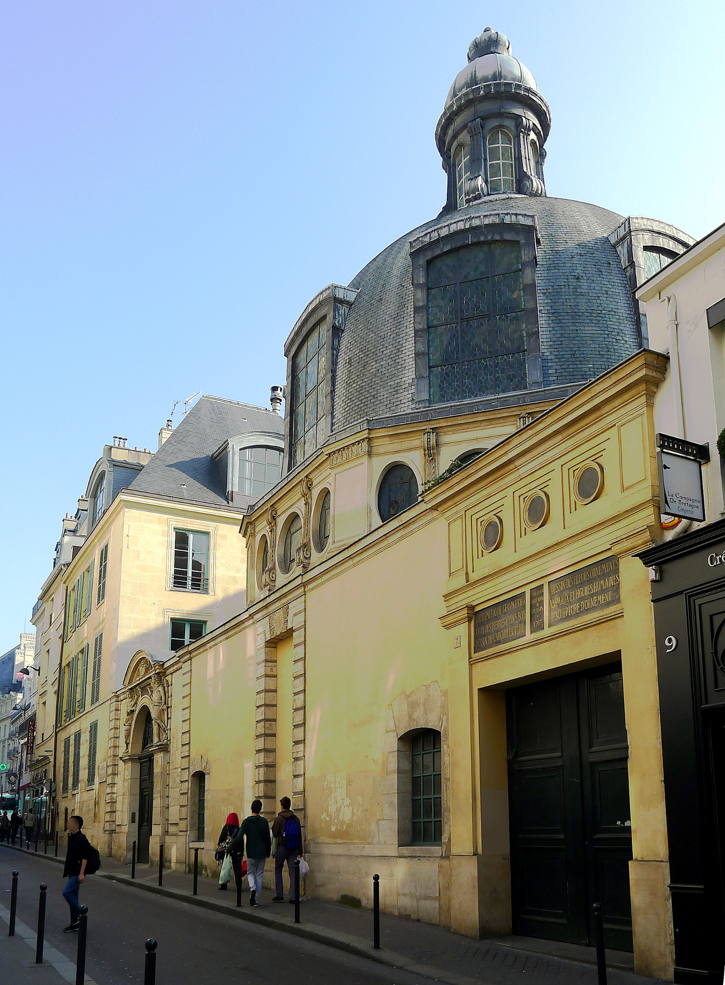 Rue de l'École-de-Médecine (n°5 : ancienne académie royale de médecine) - Paris VI .